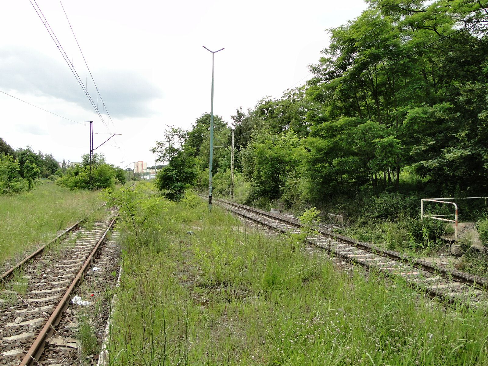 Przystanek kolejowy Szczecin Żelechowo